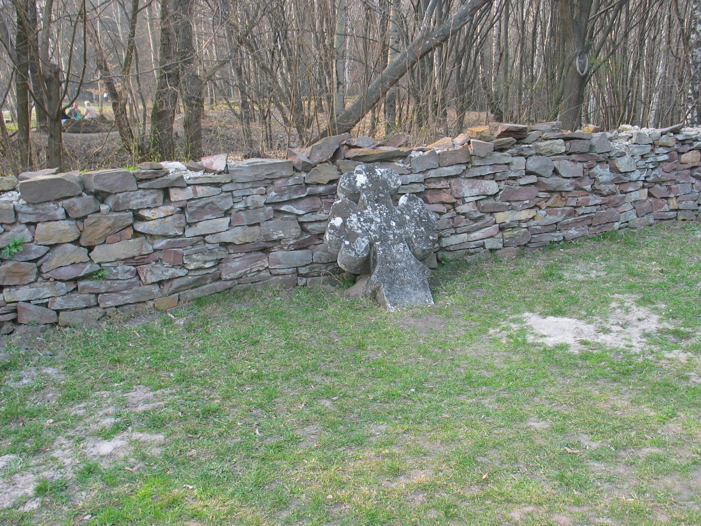 Національний музей народної архітектури і побуту України (с. Пирогів), Київ, Червонопрапорна вул., с. Пирогів